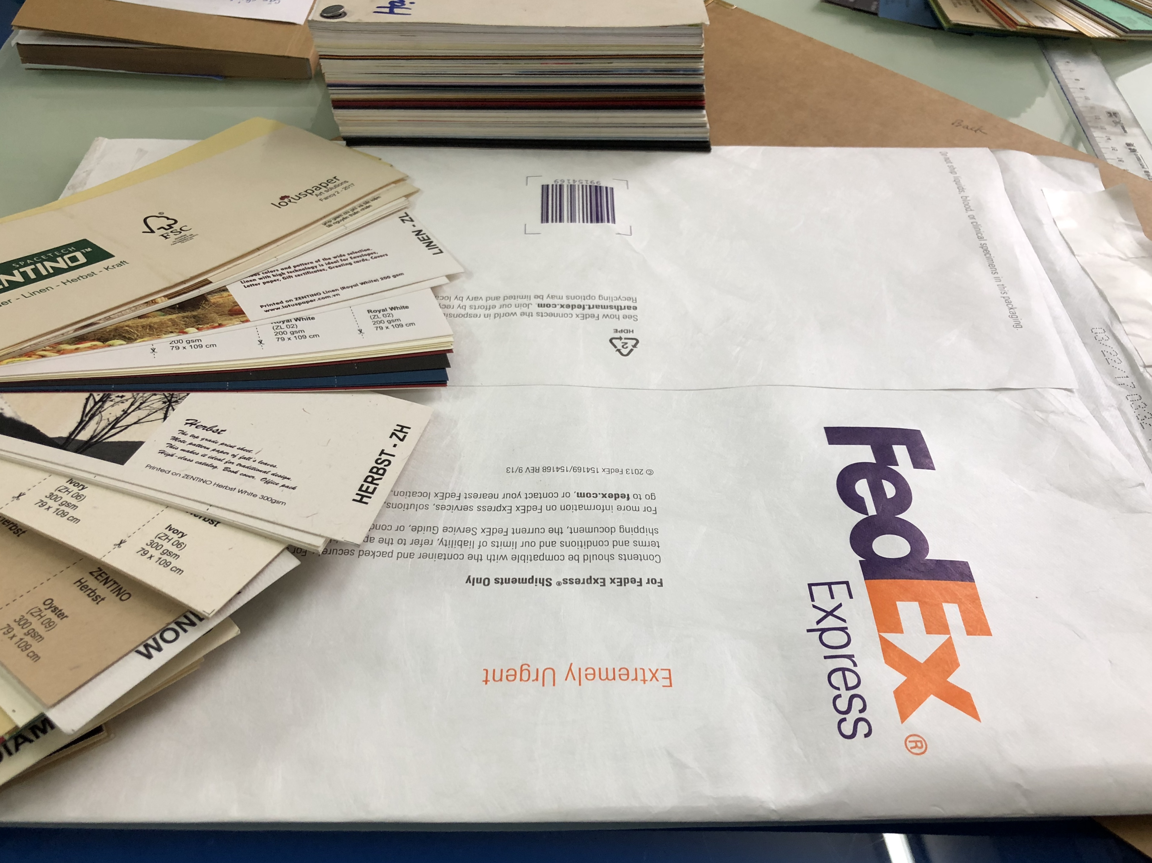 Phong bì FedEx giấy Tyvek của Dupont